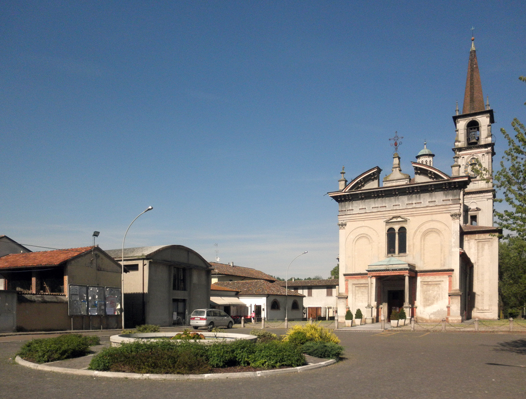 La piazza centrale di Bertonico